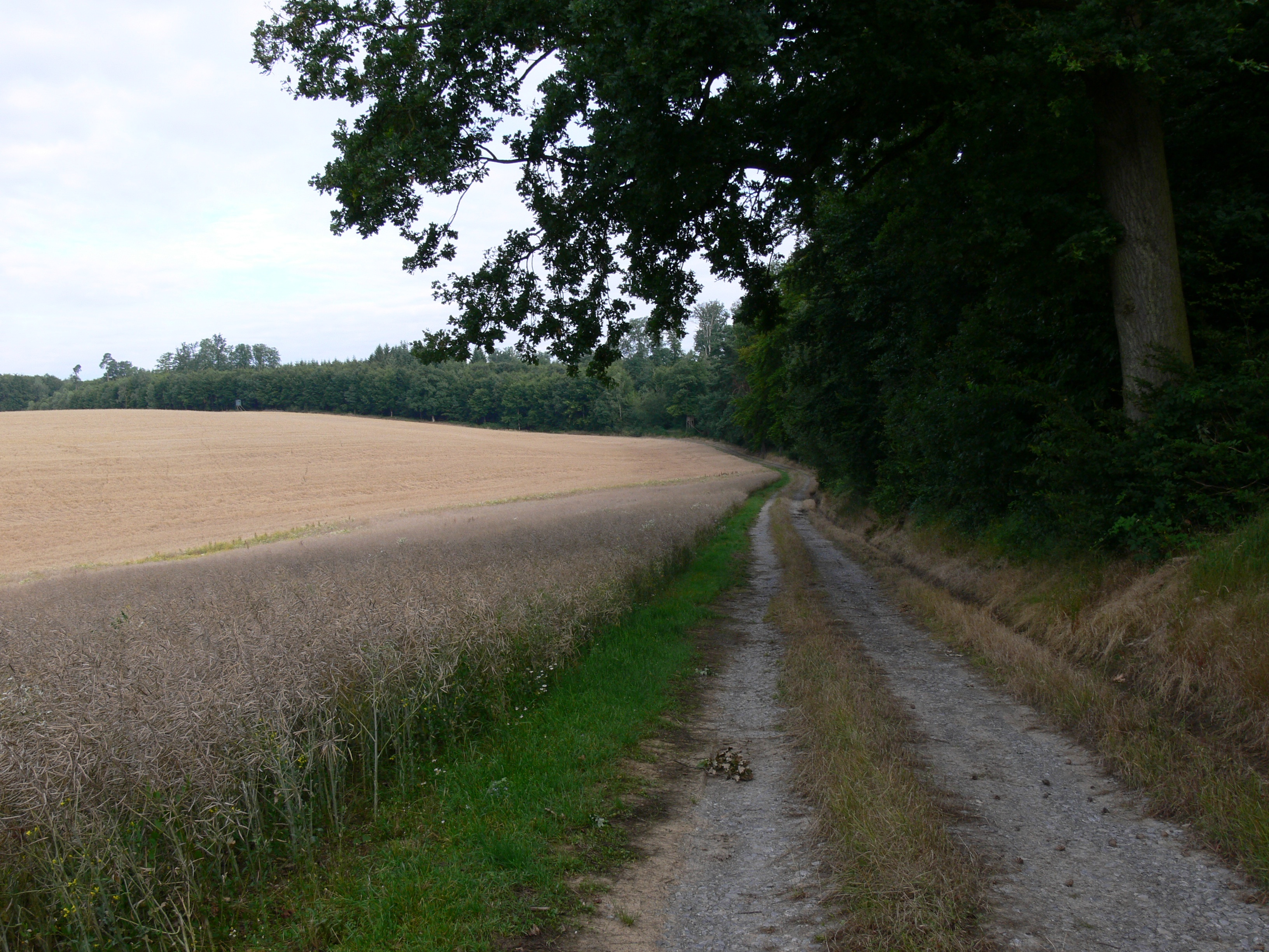 Die Hohe Straße zwischen Kocher und Jagst bei Neuzweiflingen in Baden-Württemberg